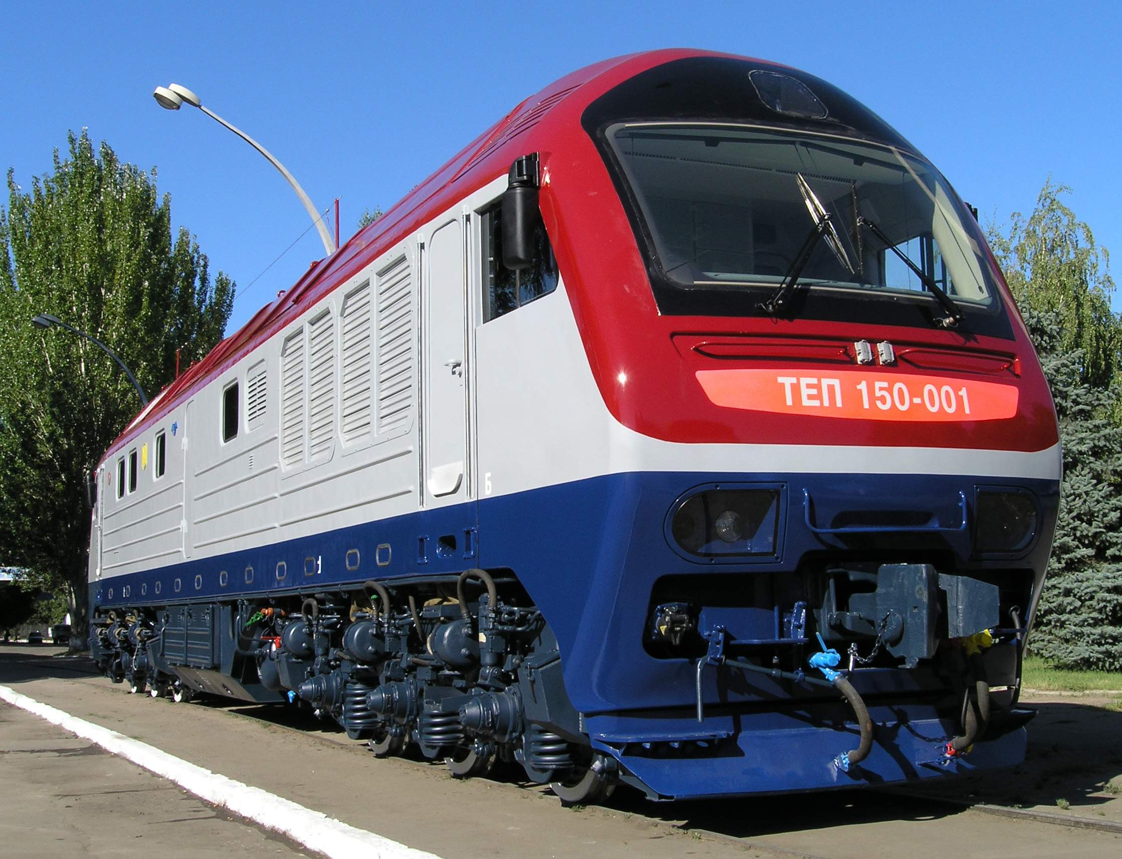 Тепловоз ТЭП150 - внешний вид.